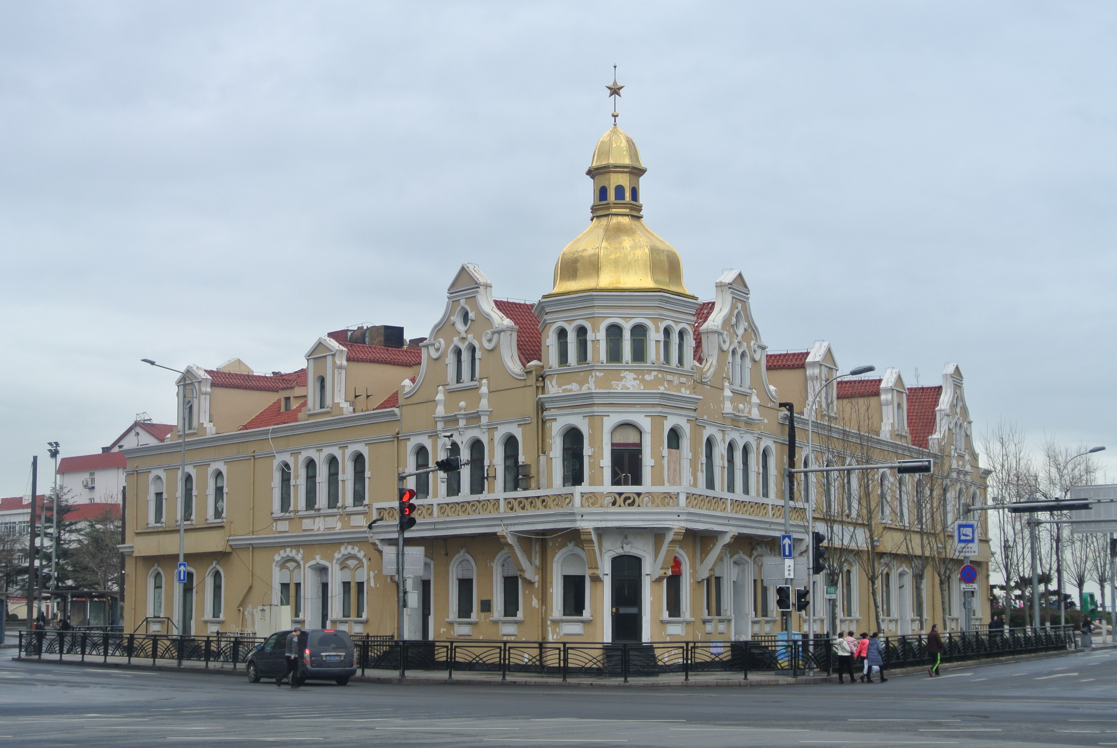 青岛车站饭店旧址